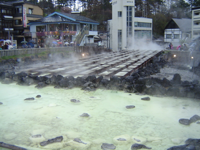 草津温泉の湯畑